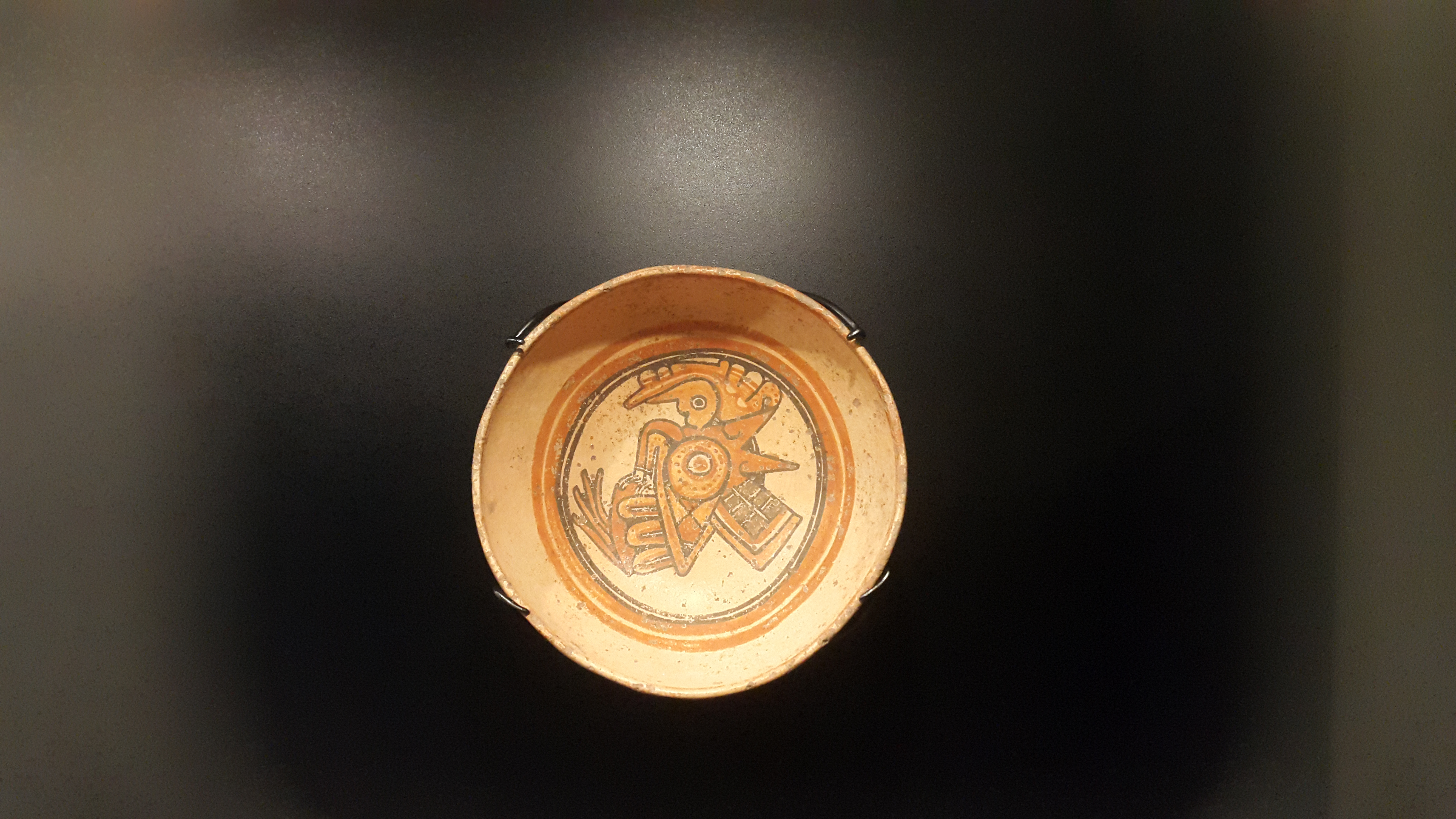 Plato de cerámica nicoya decorado con motivos mesoamericanos. 800 d.C. Museo del Jade, Costa Rica.